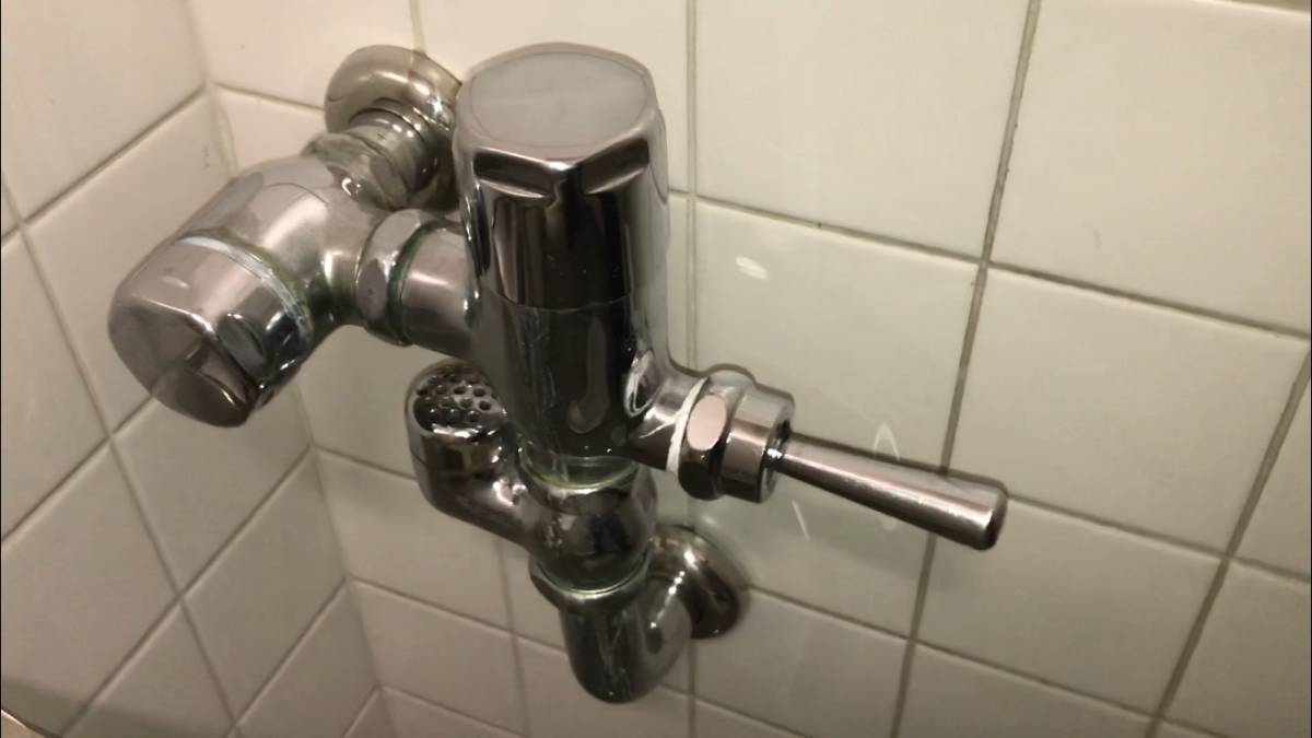 C75 MK7-23